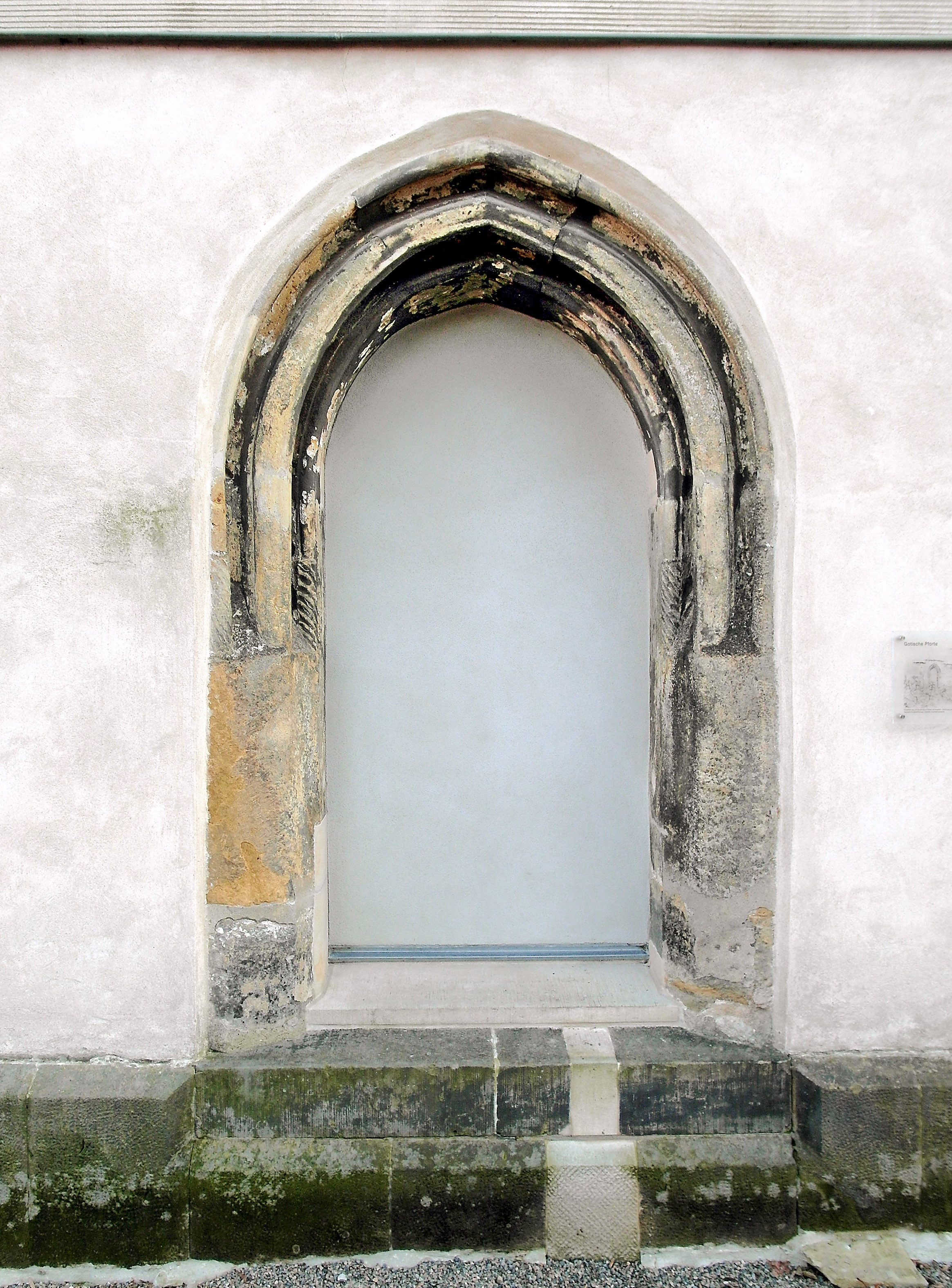 02.12.2012 01187 Dresden-Plauen, Reckestraße 6 (GMP: 51.028935,13.704658): Ev.-Luth. Auferstehungskirche. 700jährige Vorgeschichte mit vielen Umbauten. Früher hieß sie Michaeliskirche. Gotische Pforte an der Westfassade. [SAM5207.JPG]20121202110DR.JPG(c)Blobelt